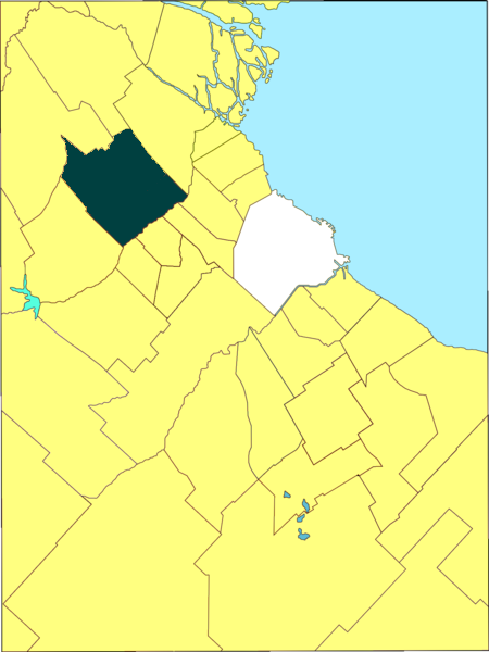 Partido de General Sarmiento, provincia de Buenos Aires, Argentina.